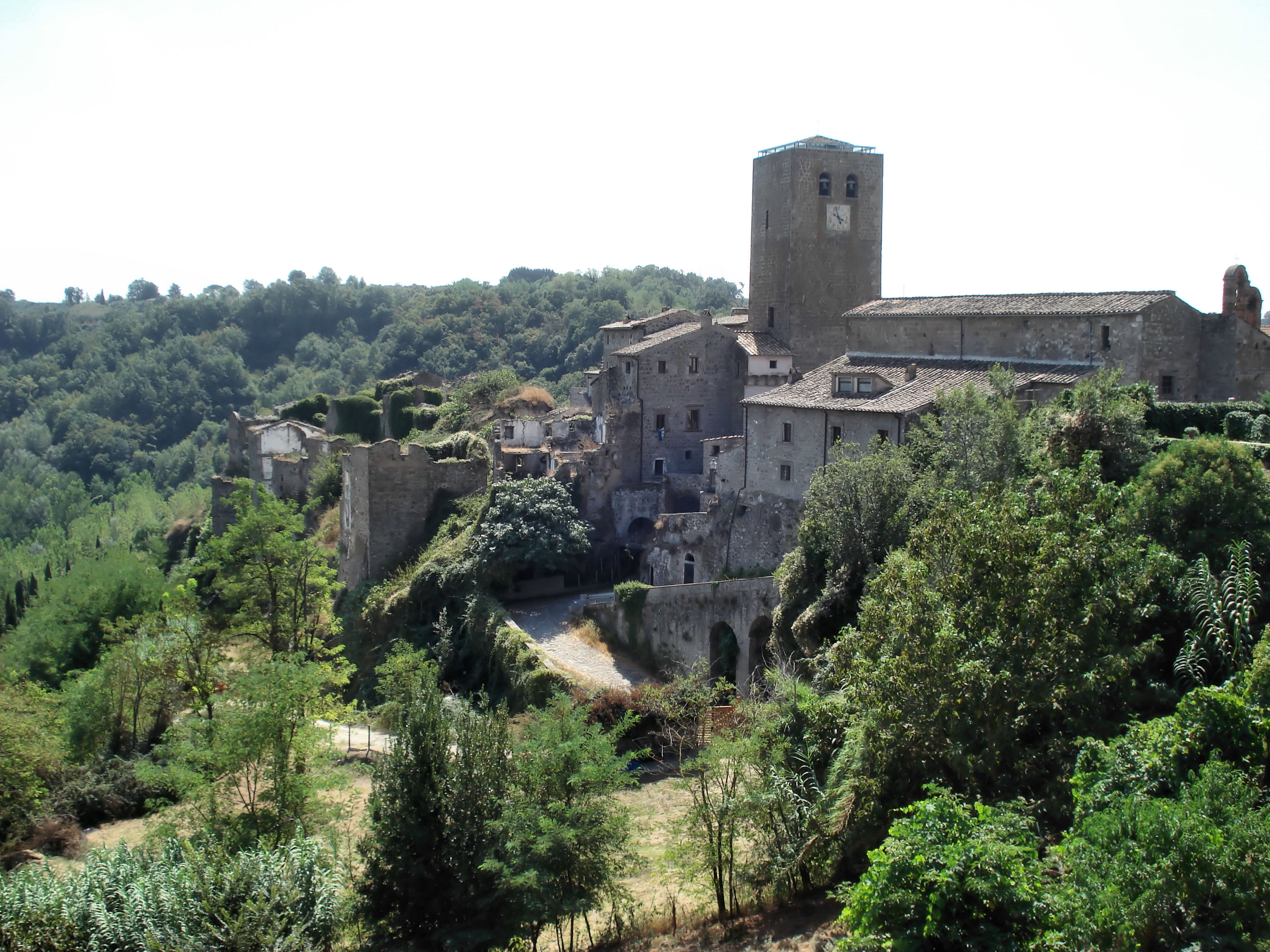 Cosmin latan,Bassano in Teverina